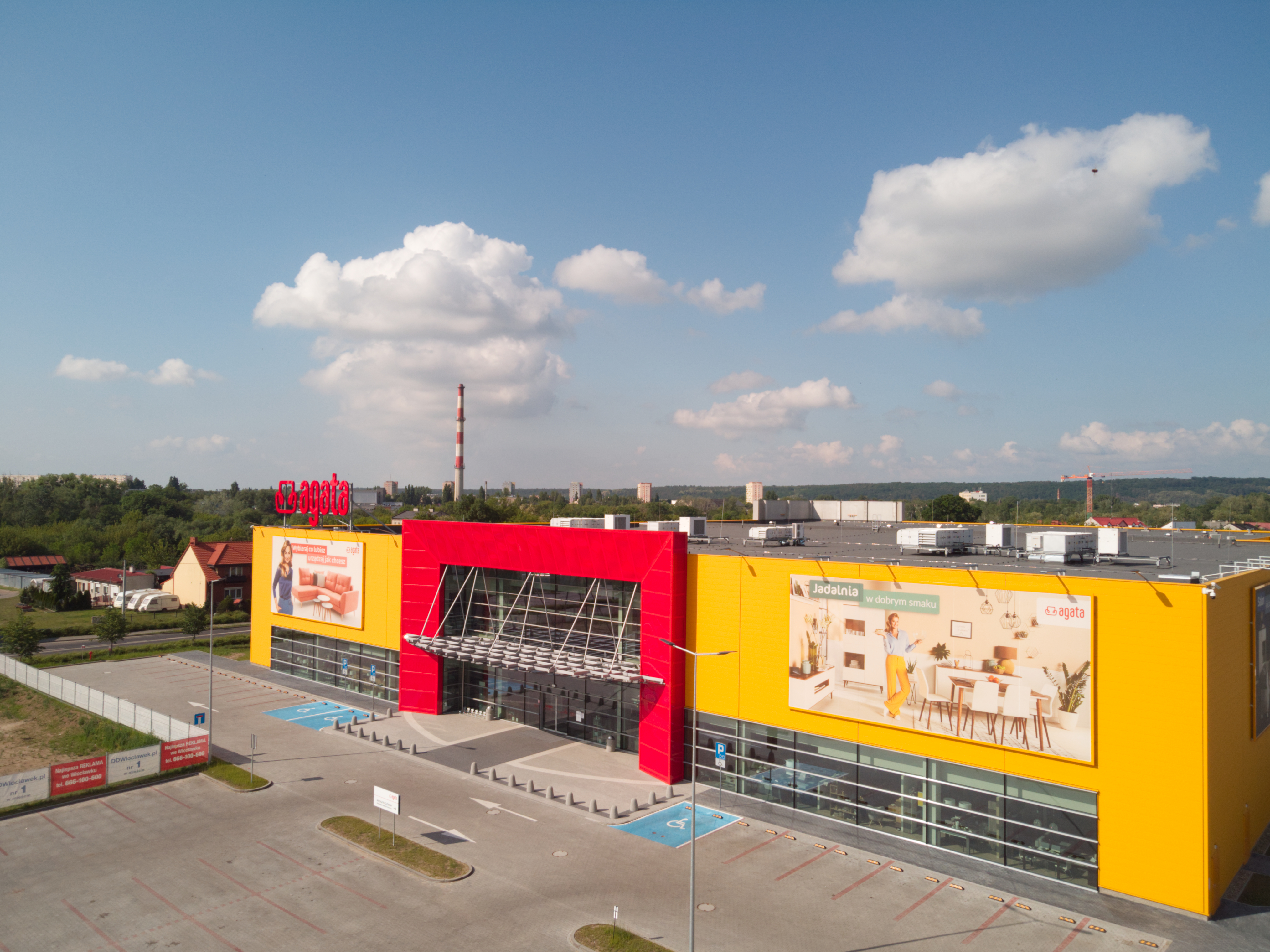 Budynek wybudowany na terenie dawnej jednostki wojskowej (2020 r.)